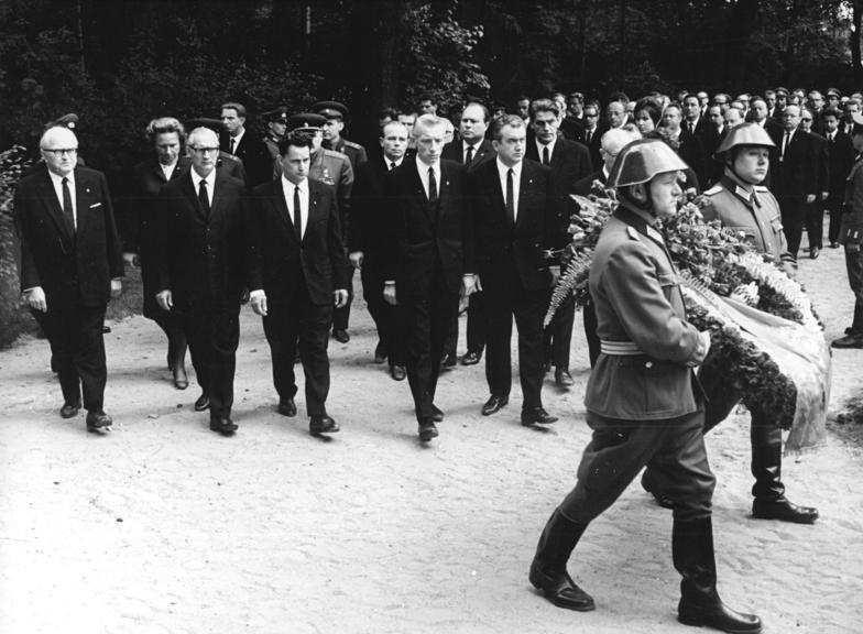 Zentralbild Koard 11.7.1967 Magdeburg: Abschied von den Opfern des Verkehrsunglückes bei Langenweddingen Die Bevölkerung der DDR nahm mit einer Trauerfeier auf dem Magdeburger Westfriedhof am 11.7.1967 von den Opfern des tragischen Verkehrsunglückes Abschied. Hinter den Angehörigen der NVA mit den Kränzen schritten die Mitglieder der Delegation des Zentralkomitees der SED und des Ministerrates der DDR. In der ersten Reihe v.l.n.r.: Dr. Erwin Kramer, Max Sefrin, Alois Pisnik, Wolfgang Rauchfuß, Dr. Kurt Wünsche und Friedrich Dickel (halbverdeckt).